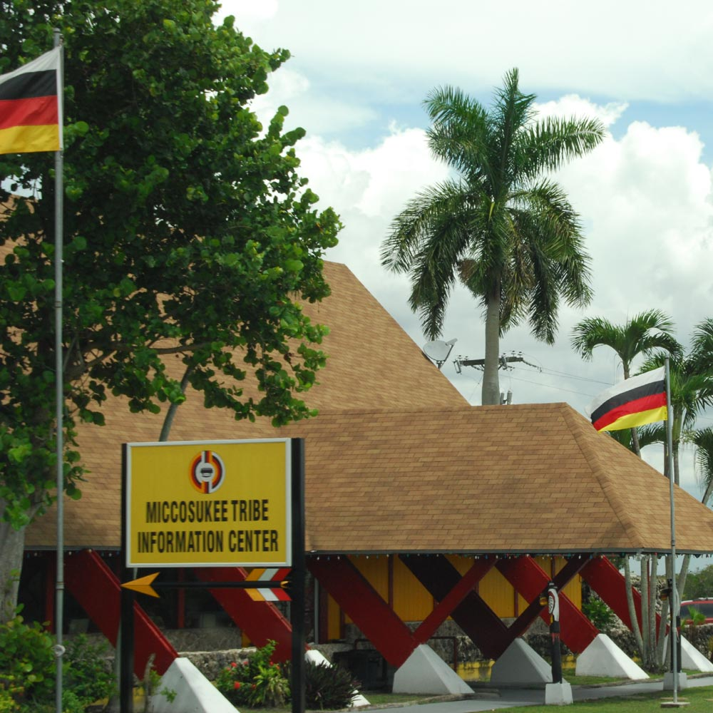 Informationszentrum des Mikasuki-Stammes in den Everglades (Florida, USA)